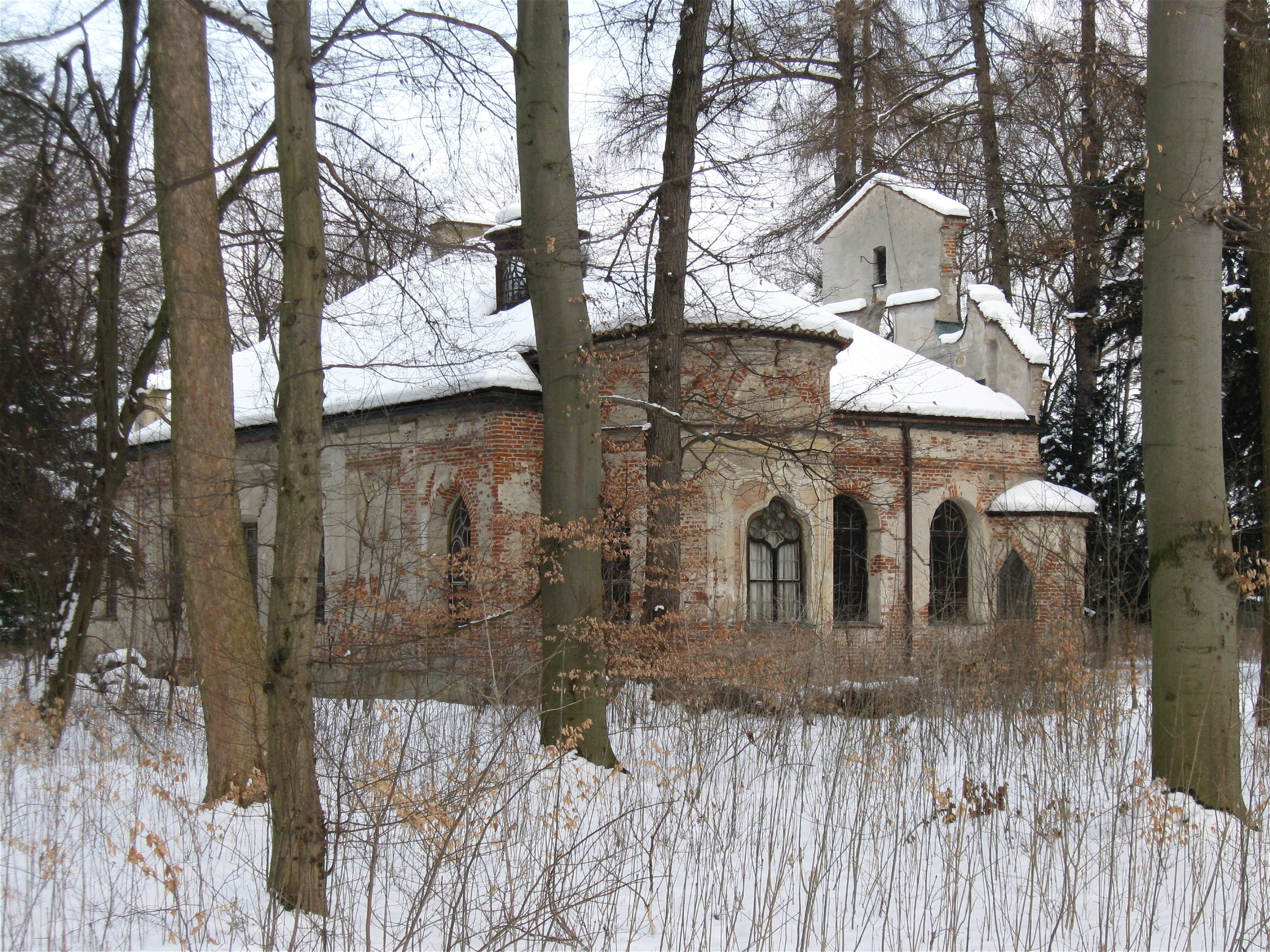 Schlosspark Nymphenburg, Magdalenenklause